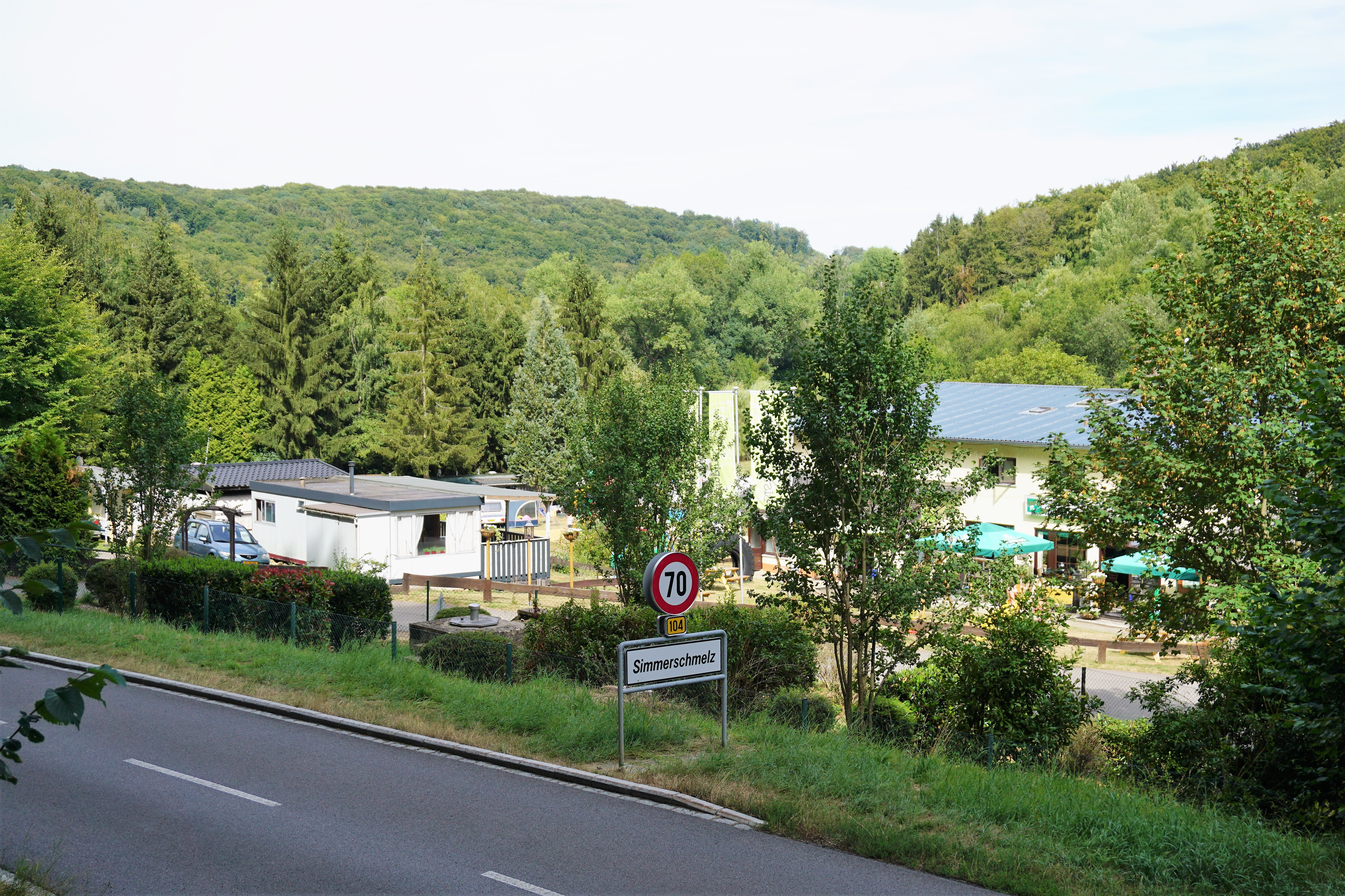 Lieu-dit Simmerschmelz, commune de Habscht. CR104, vue sur le camping.